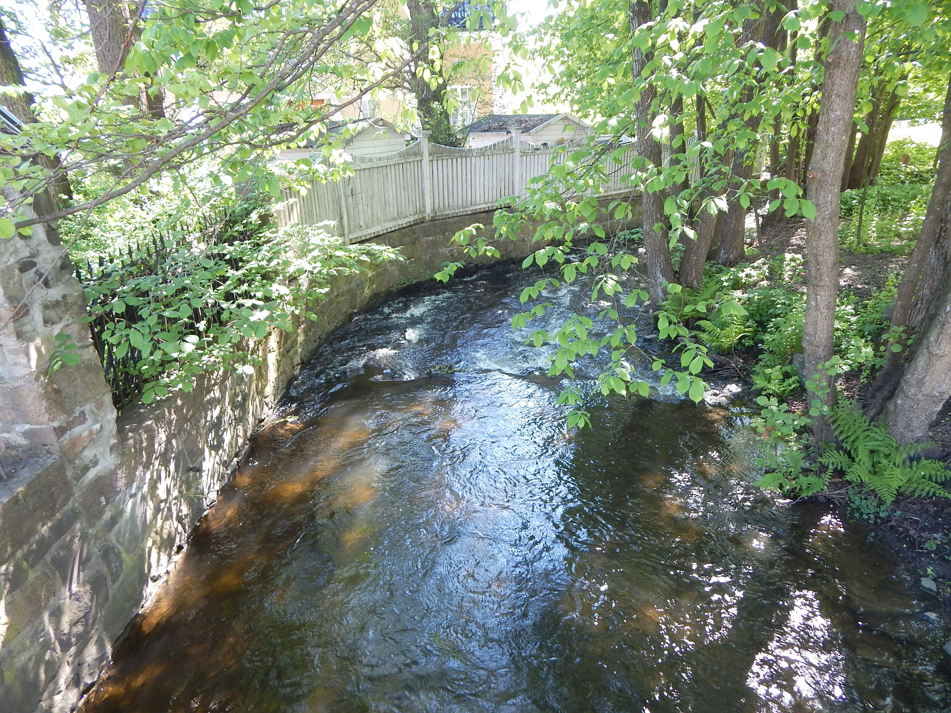 Sognsvannsbekken like sør for Rasmus WInderens vei